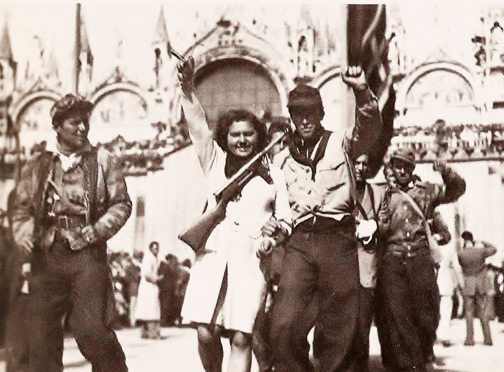 Partigiani garibaldini in piazza San Marco a Venezia nell'aprile 1945